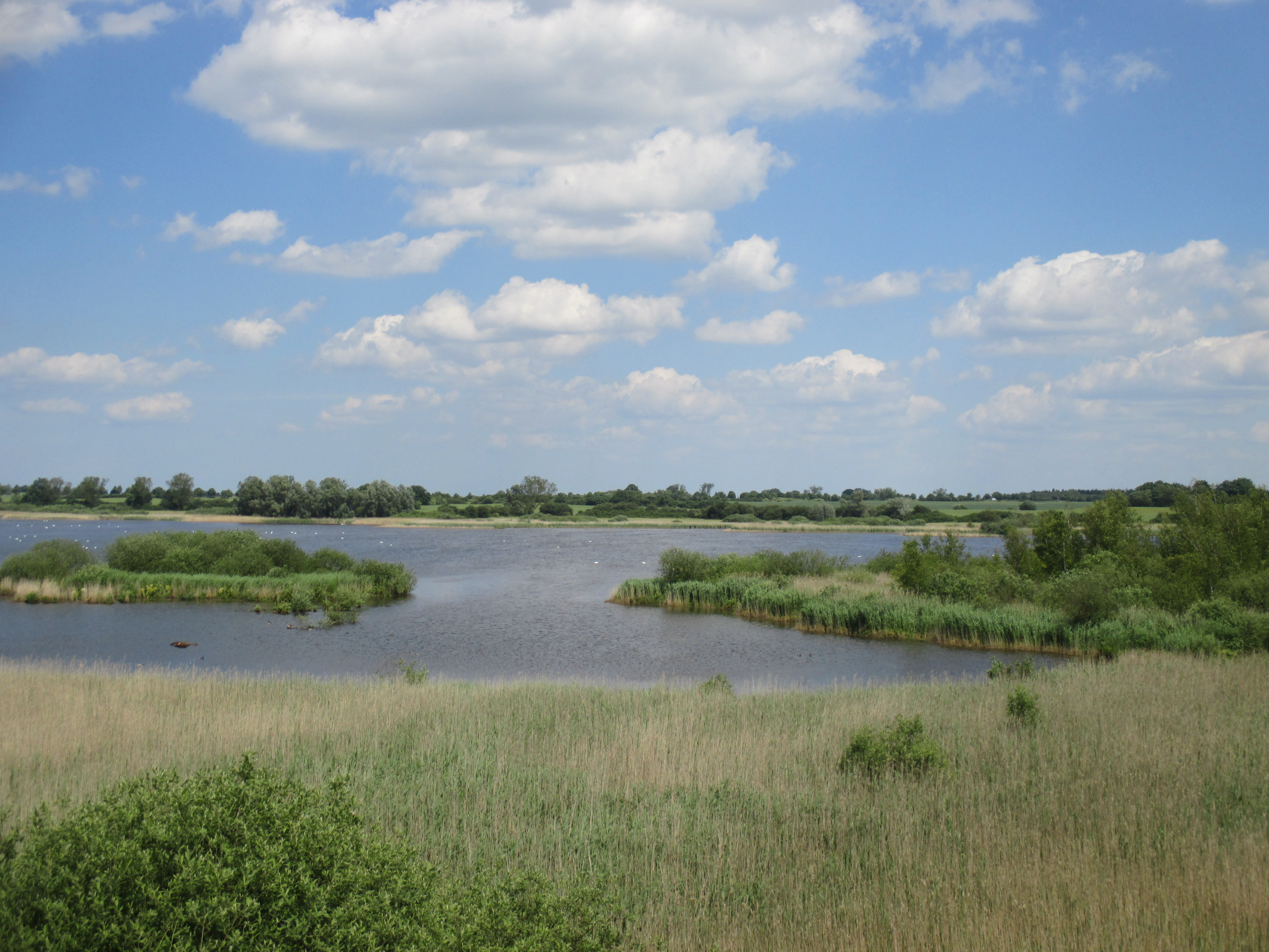 Großer Dambecker See im Naturschutzgebiet Dambecker Seen